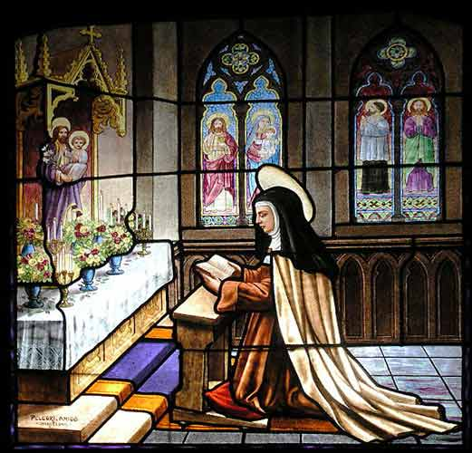 Santa Teresa de Avila, pintura vidrio en Convento de Santa Teresa.